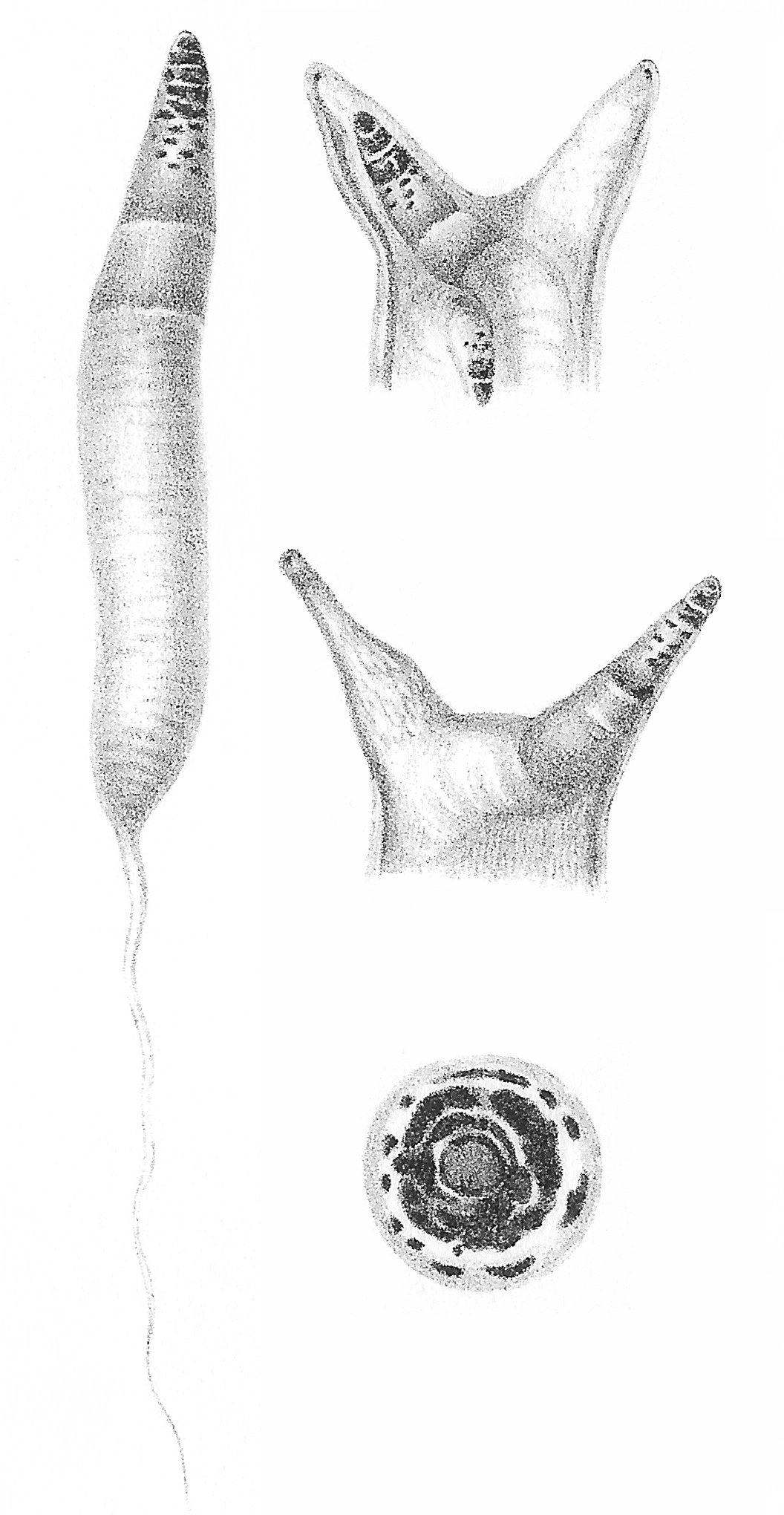 Leucochloridium_paradoxum; parasite in Succinea putris